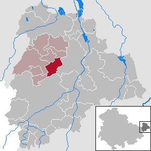 Göhren in Thuringia - District Altenburger Land